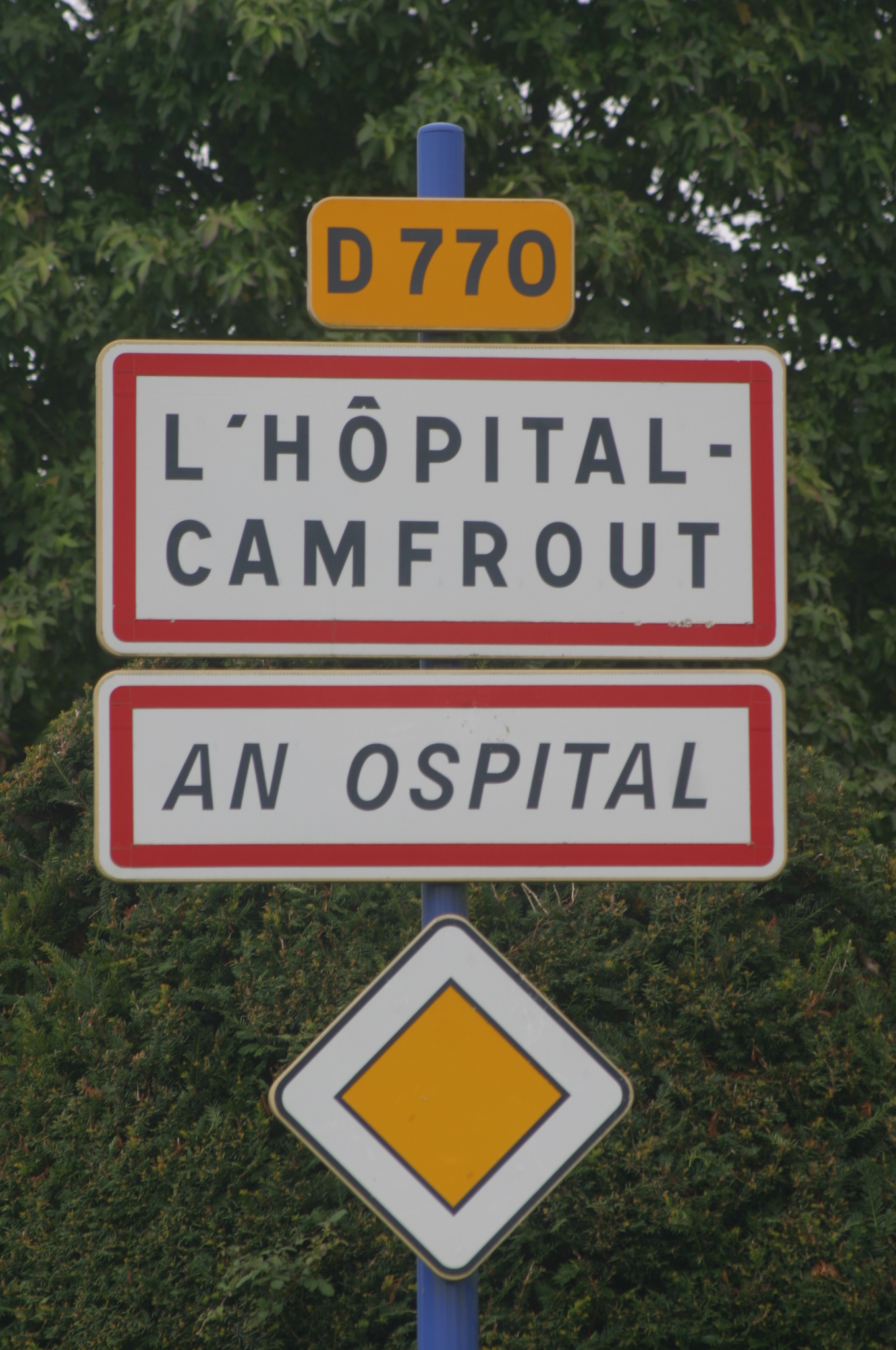 Panneau routier